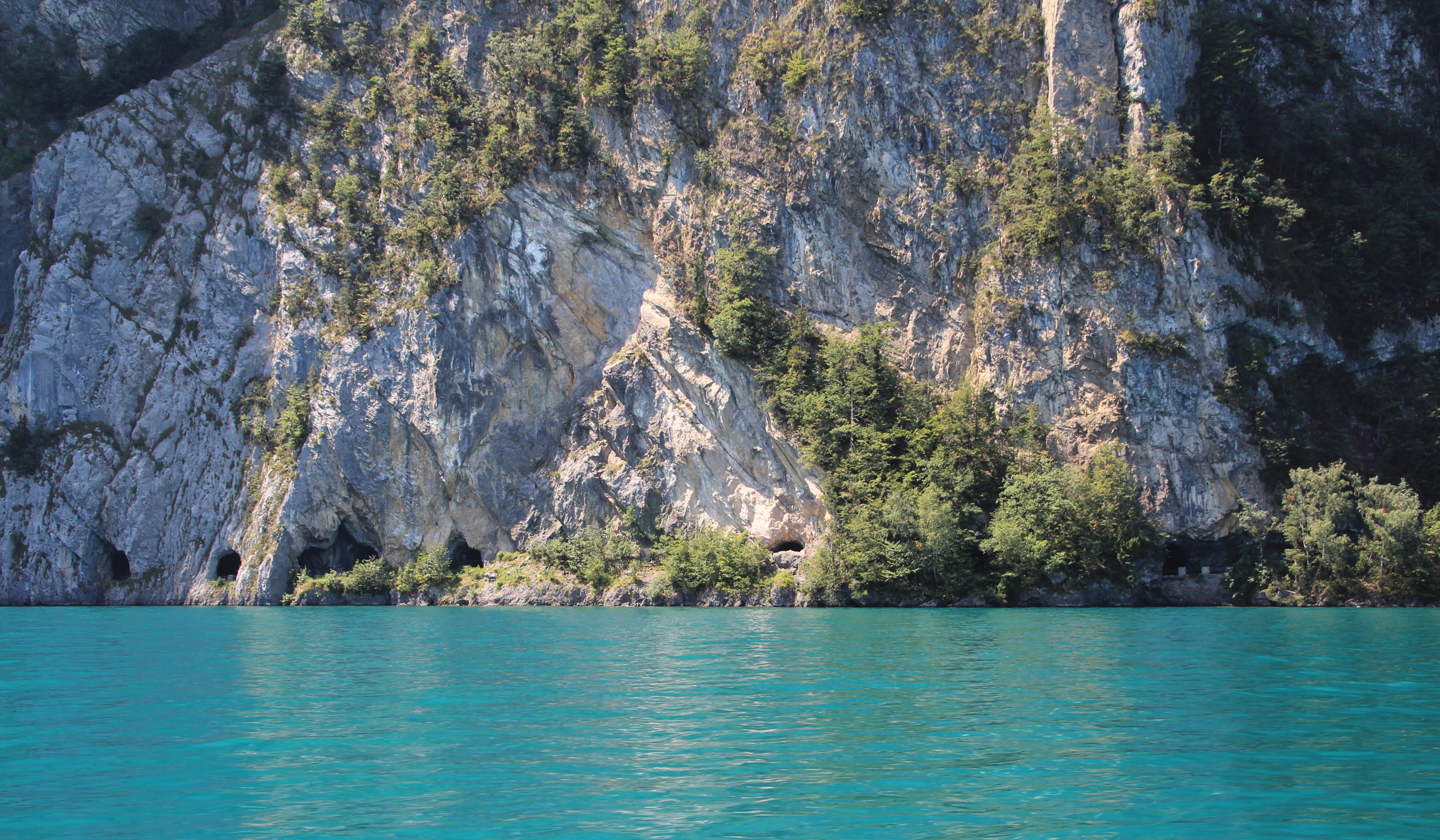 Bauen UR Zufahrtstrasse von Norden